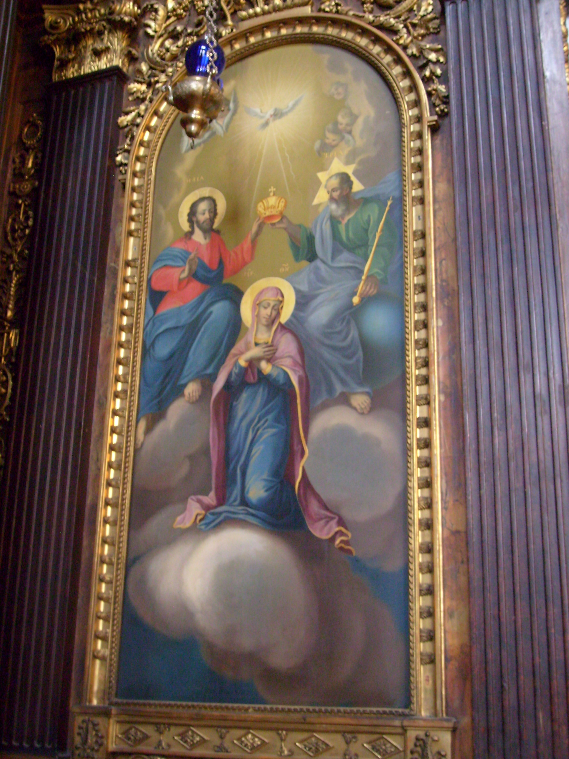 Ikone in der griechisch-orthodoxen Kirche zur Hl. Dreifaltigkeit, Wien: Krönung Mariens.